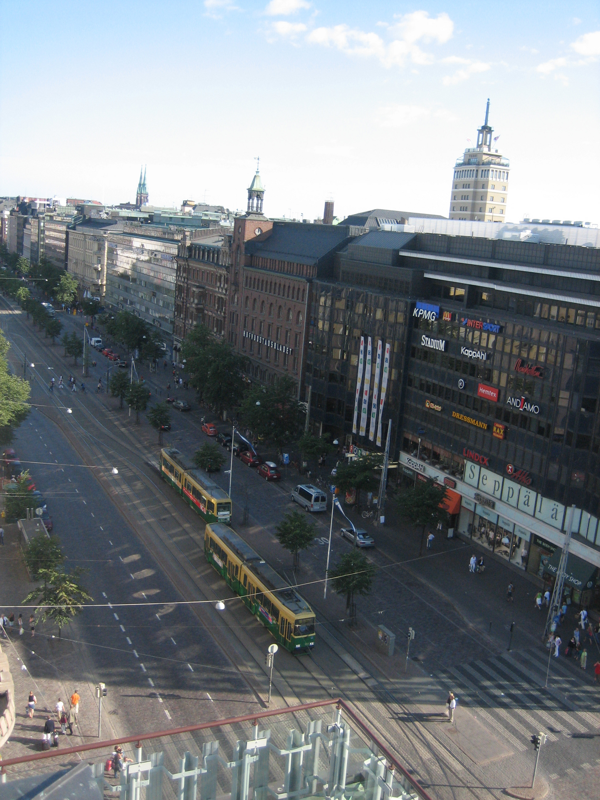 Mannerheimintie Helsingissä, elokuu 2006.